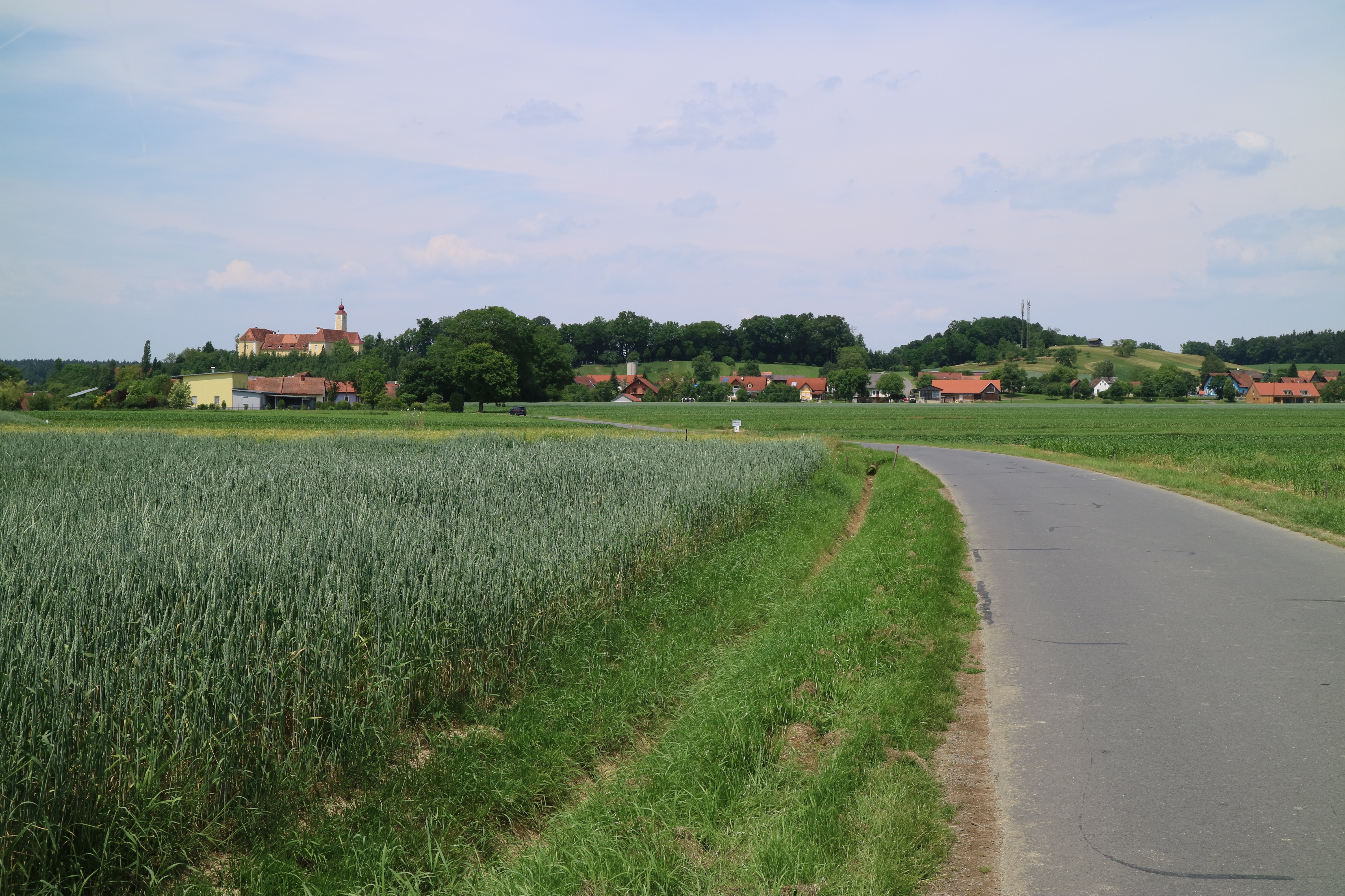 Weinburg am Saßbach von Südosten